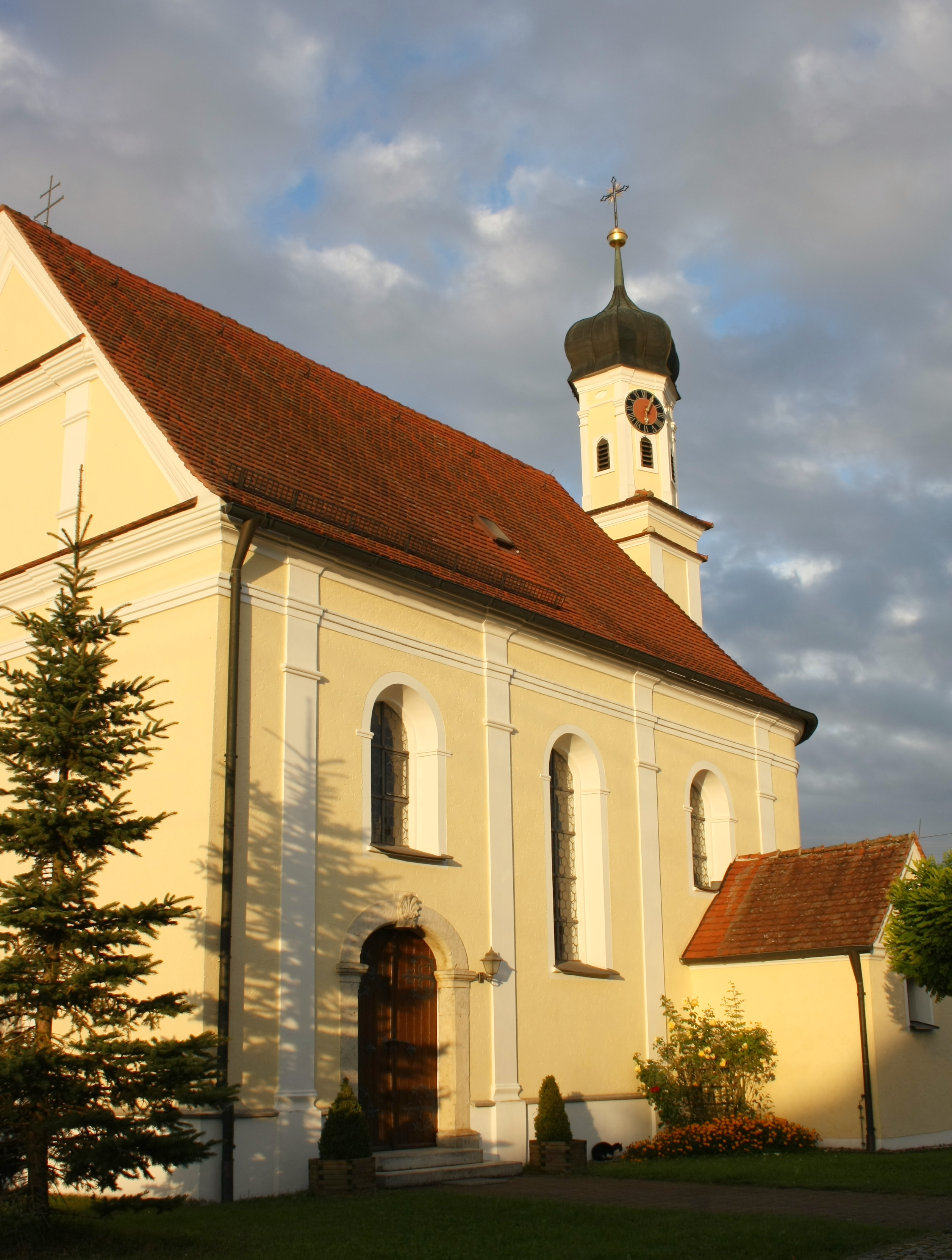 Katholische Filialkirche St. Nikolaus in Wolpertstetten (Blindheim), Ansicht von Süden